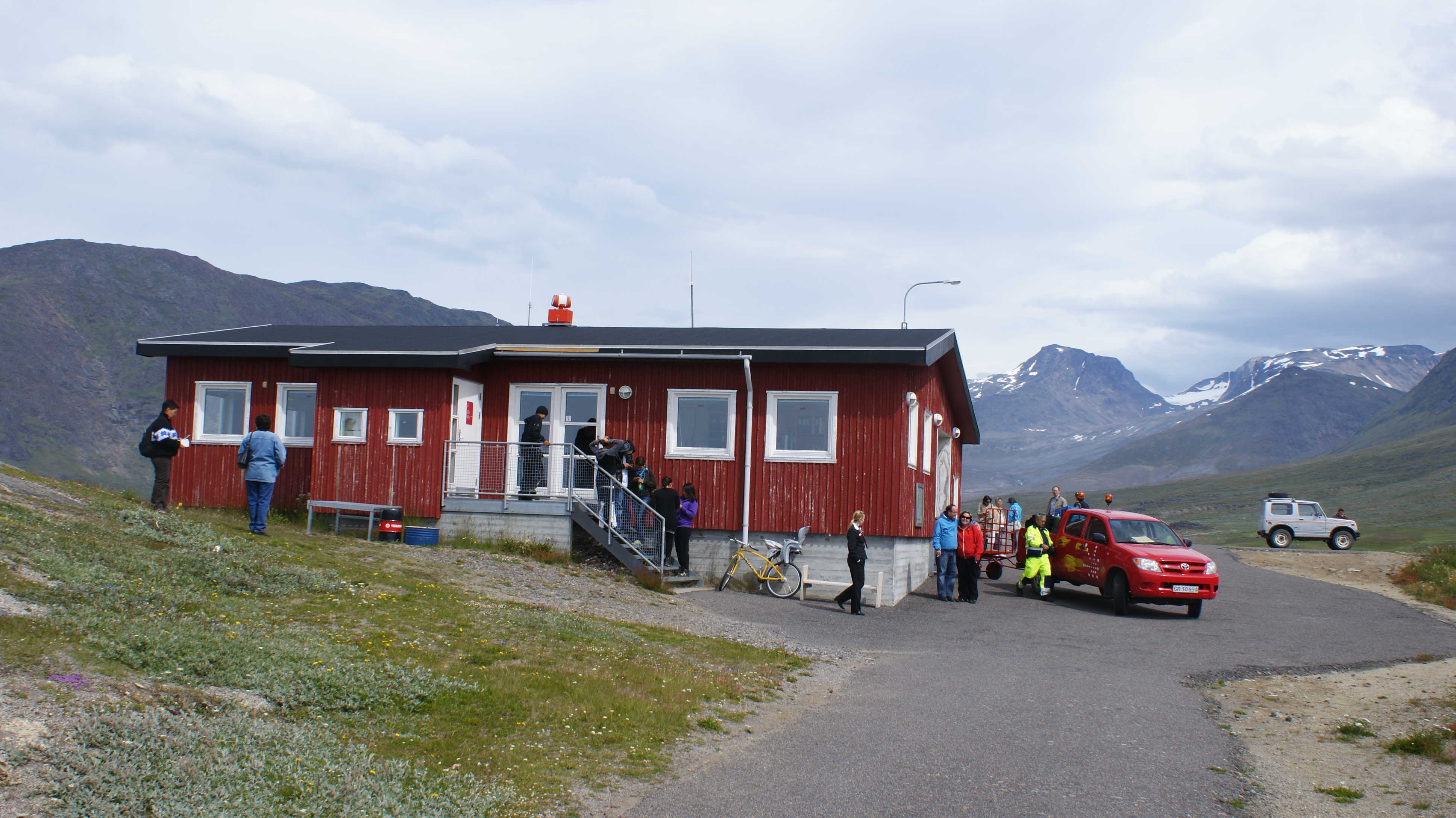 Narsaq Heliport, Greenland.